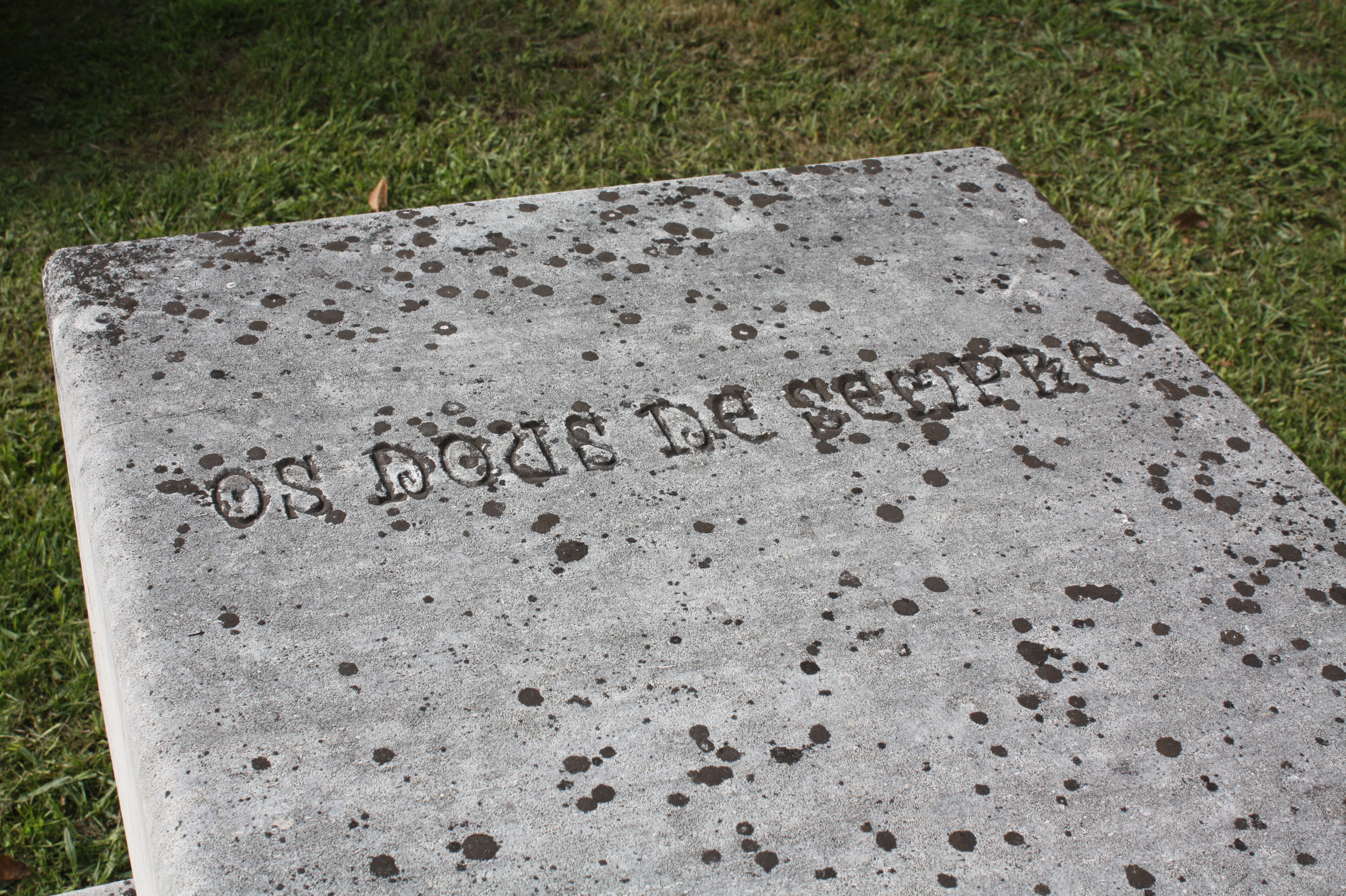 “Os dous de sempre”, título dun dos libros de Castelao, no parque do Camiño Real do Casal (en San Xoán de Poio, Pontevedra)